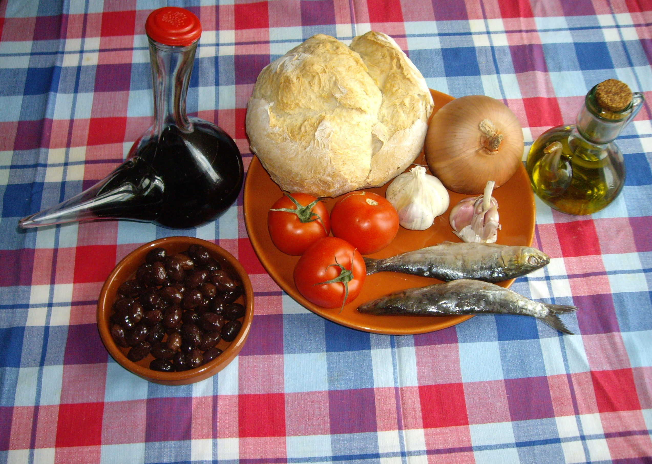 Ingredients de la clotxa tradicional